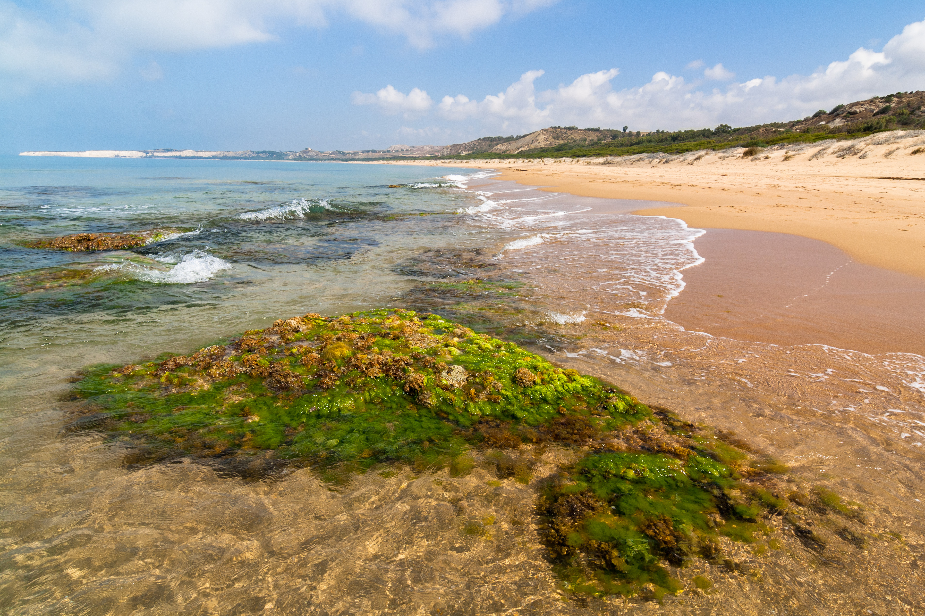 Spiaggia Torre Salsa